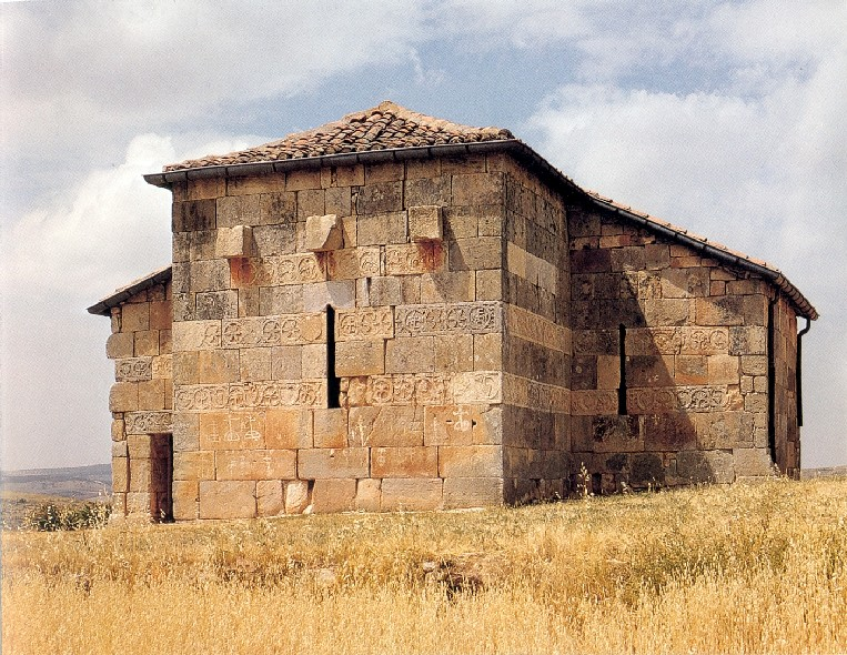 date du cliché : septembre 2001